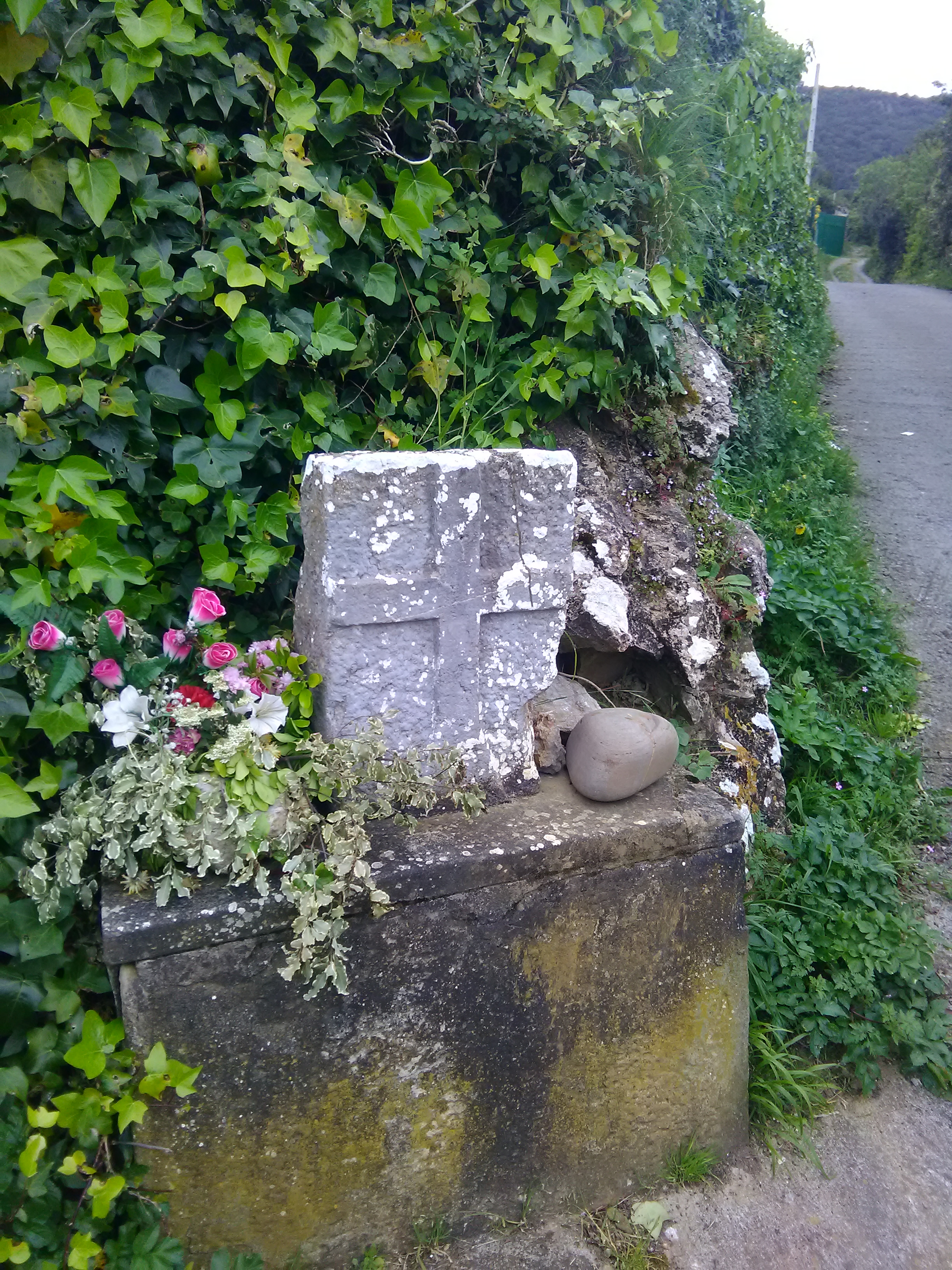 Antzorizko Santa Katalina bidea (Lekeitio). 1493ko hilketa gogoratzen duen gurutzea.